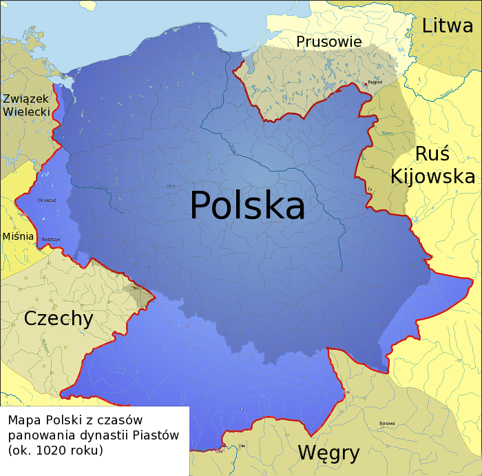 Polska w roku 1020, Porównanie